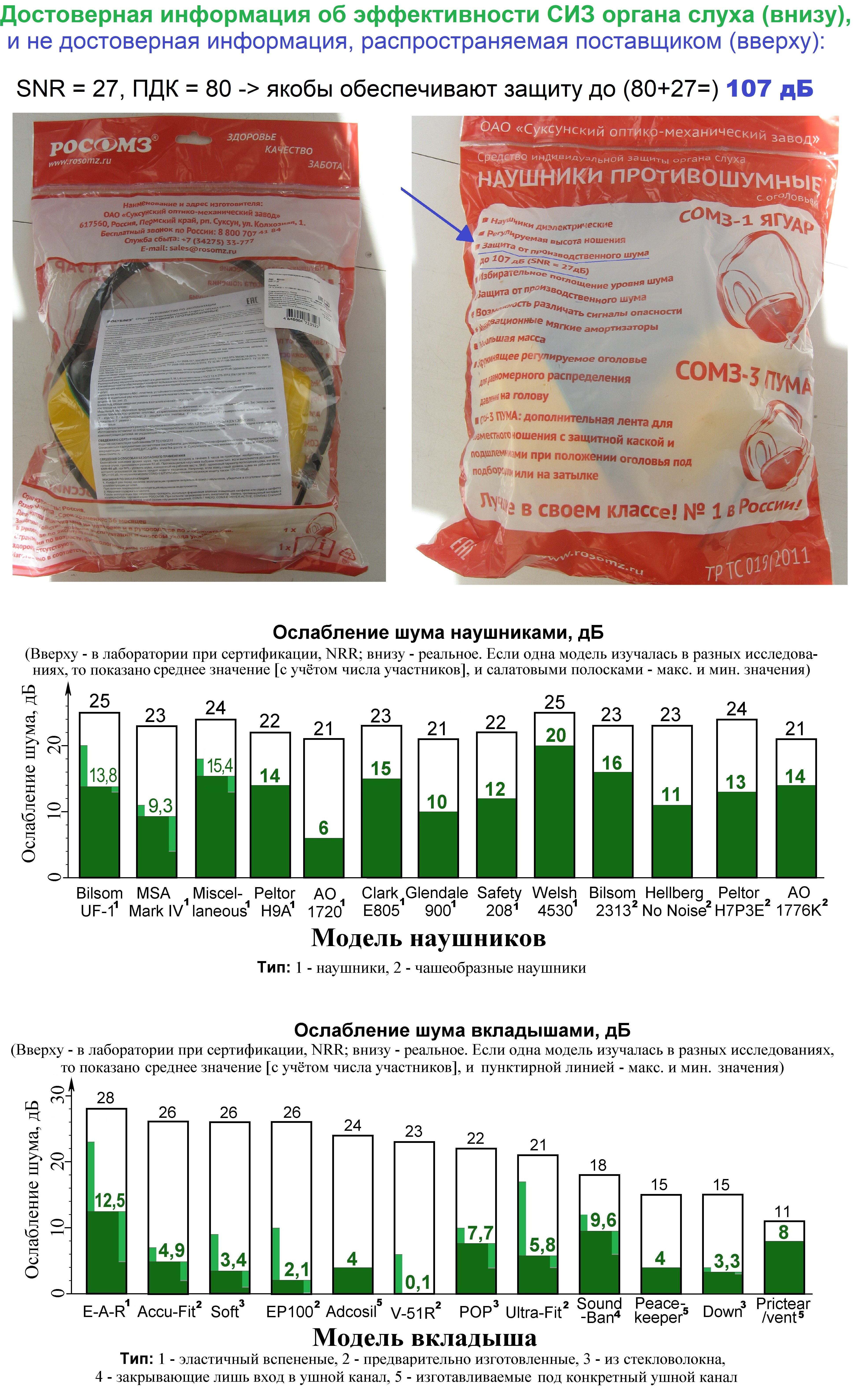 Сравнение эффективности СИЗ органа слуха, декларируемой производителем наушников (якобы лабораторная (при сертификации) равна реальной (на рабочем месте); с результатом исследований СИЗ органа слуха разных моделей и конструкций